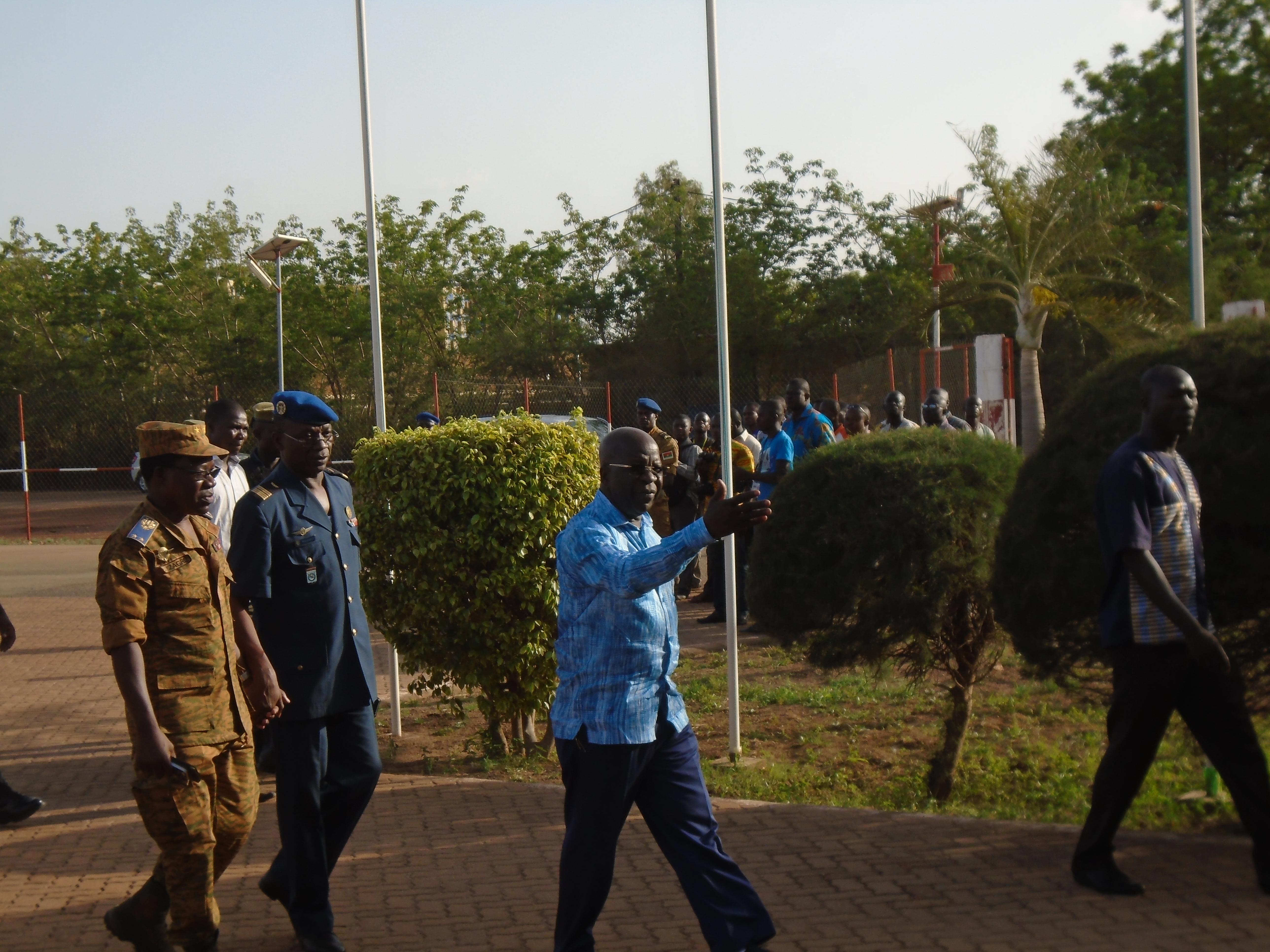 Le ministre Simon Compaoré (centre), sur les lieux de l'attaque d'Intagom en compagnie entre autres du chef d'état major général des armées, le général Pingrenoma Zagré (à g.), le 1er juin 2016. (VOA/Zoumana Wonogo)